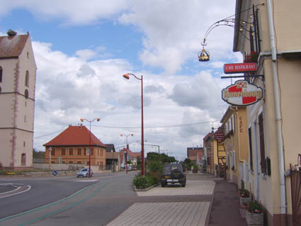 Vue général de Battenheim